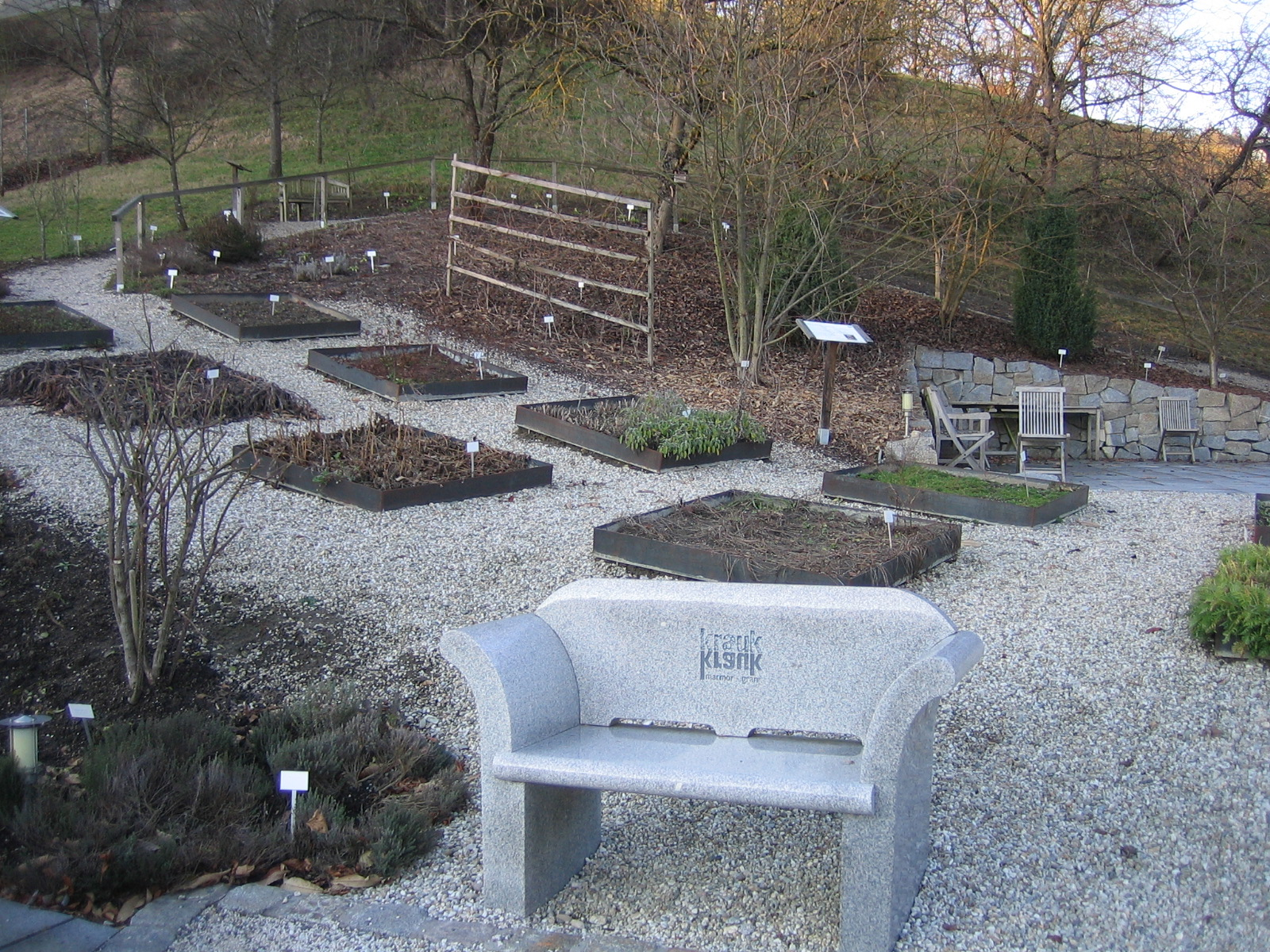 Beete & Erholung bei Schönwetter in der Sonne im Kräutergarten Bad Mühllacken